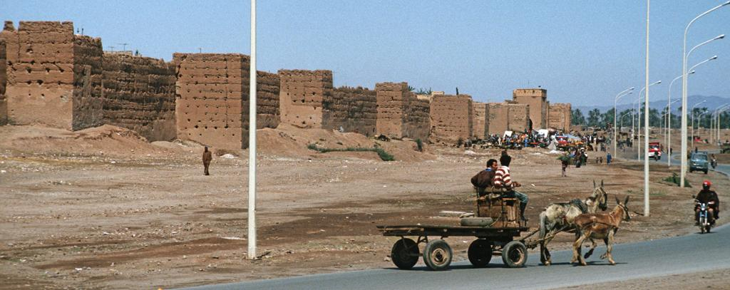 Stadtmauer